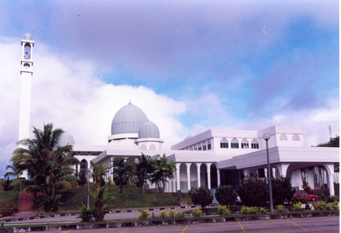 located at Gua Musang,Kelantan.